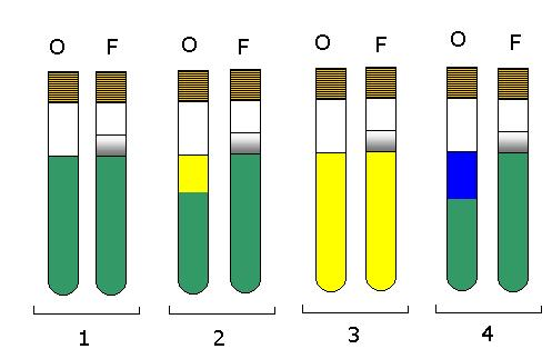 creer le 17/08/2006 par alpha.prim